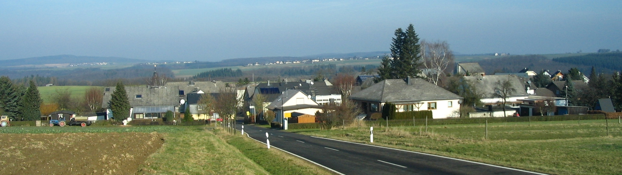 Mörz im Hunsrück